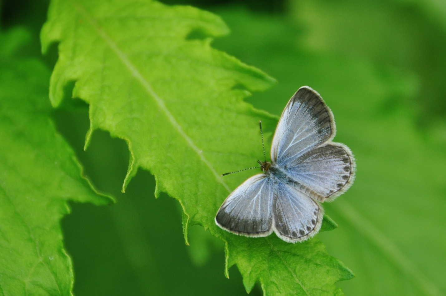 236沖繩小灰蝶28(李榮芳攝)